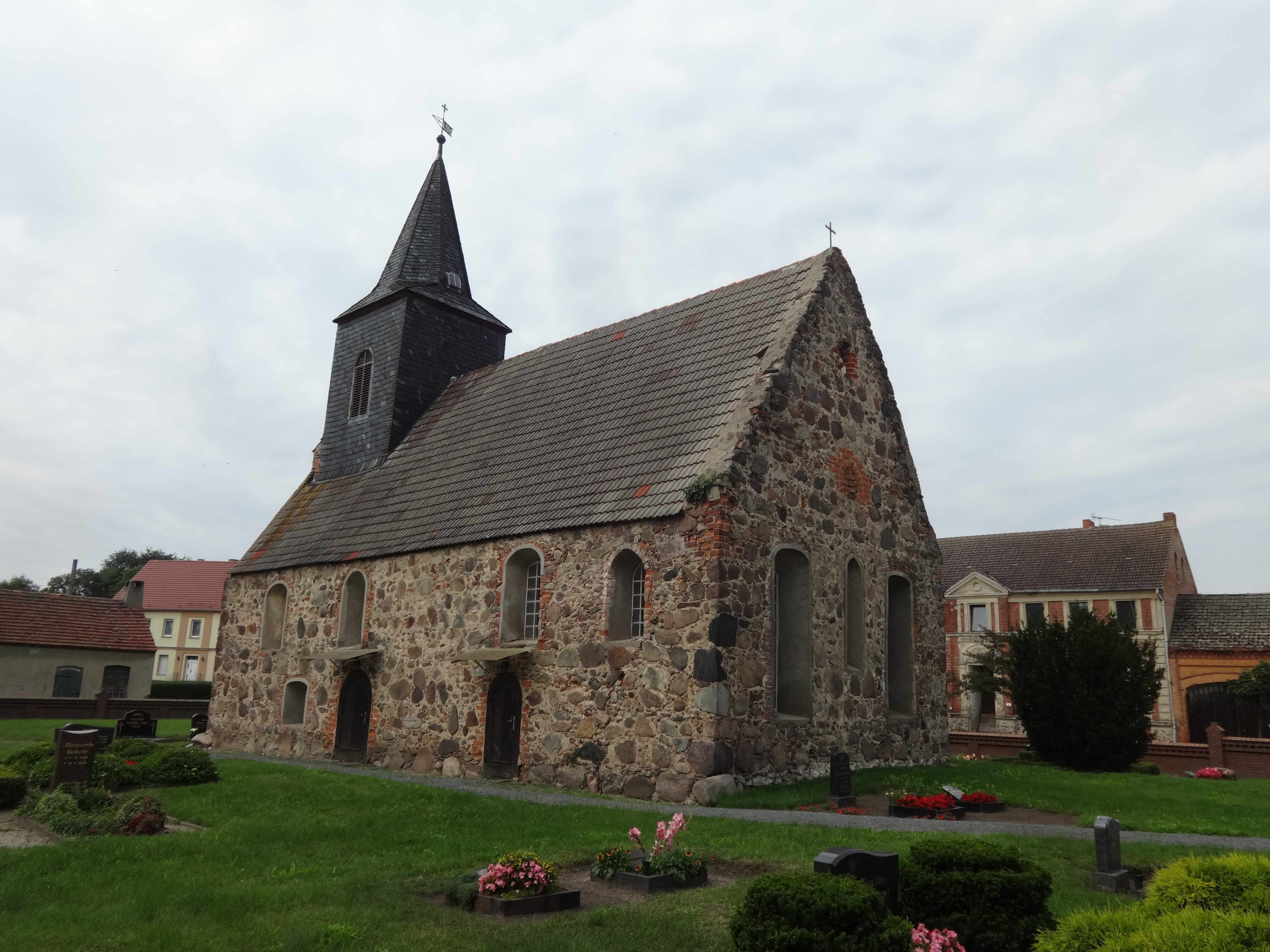 Die Dorfkirche in Neuhof (zu Jüterbog) entstand im 14. Jahrhundert. Im Innern steht unter anderem ein Kanzelalter aus der Zeit um 1700.